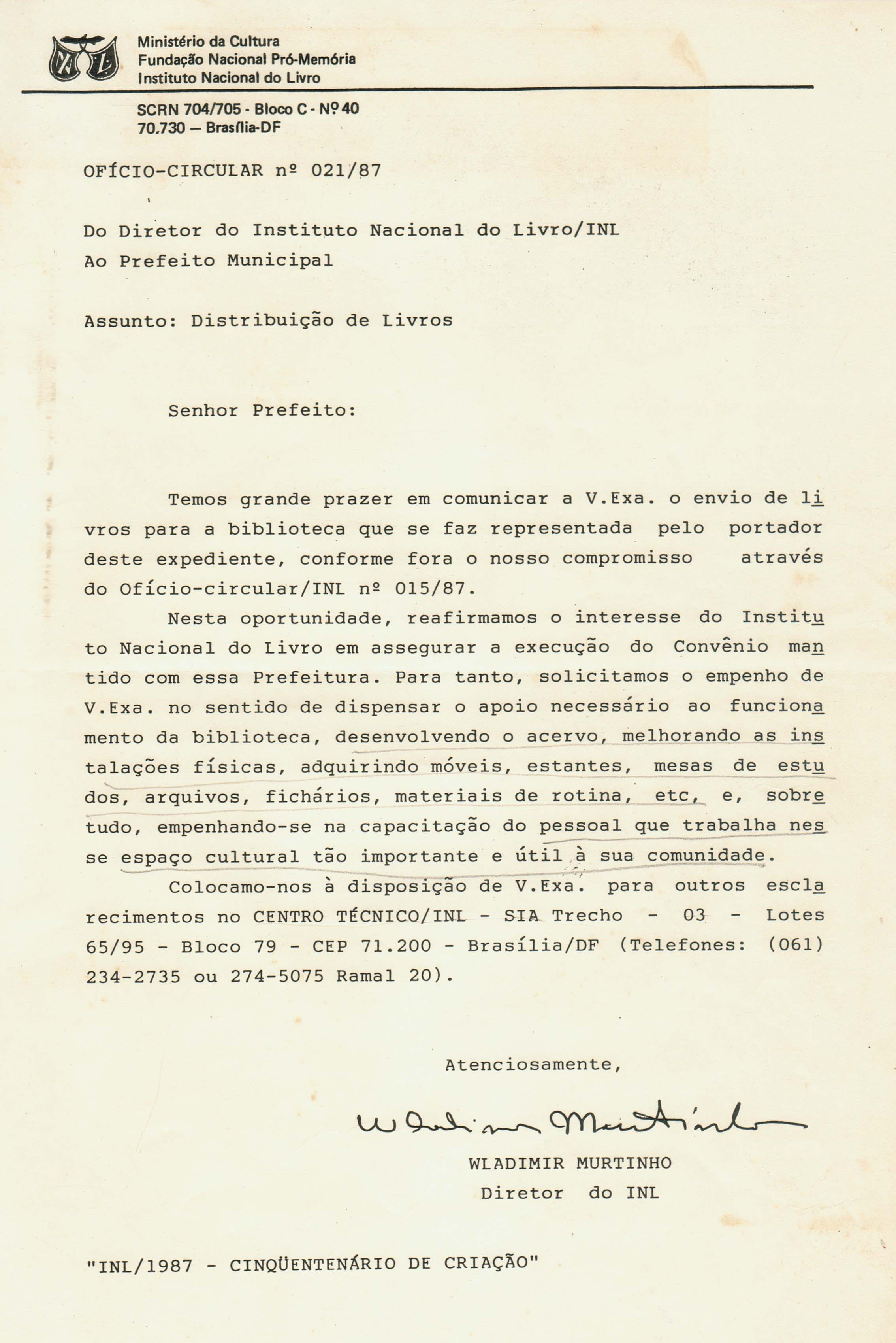 Documento do diretor do antigo Instituto Nacional do Livro do Brasil